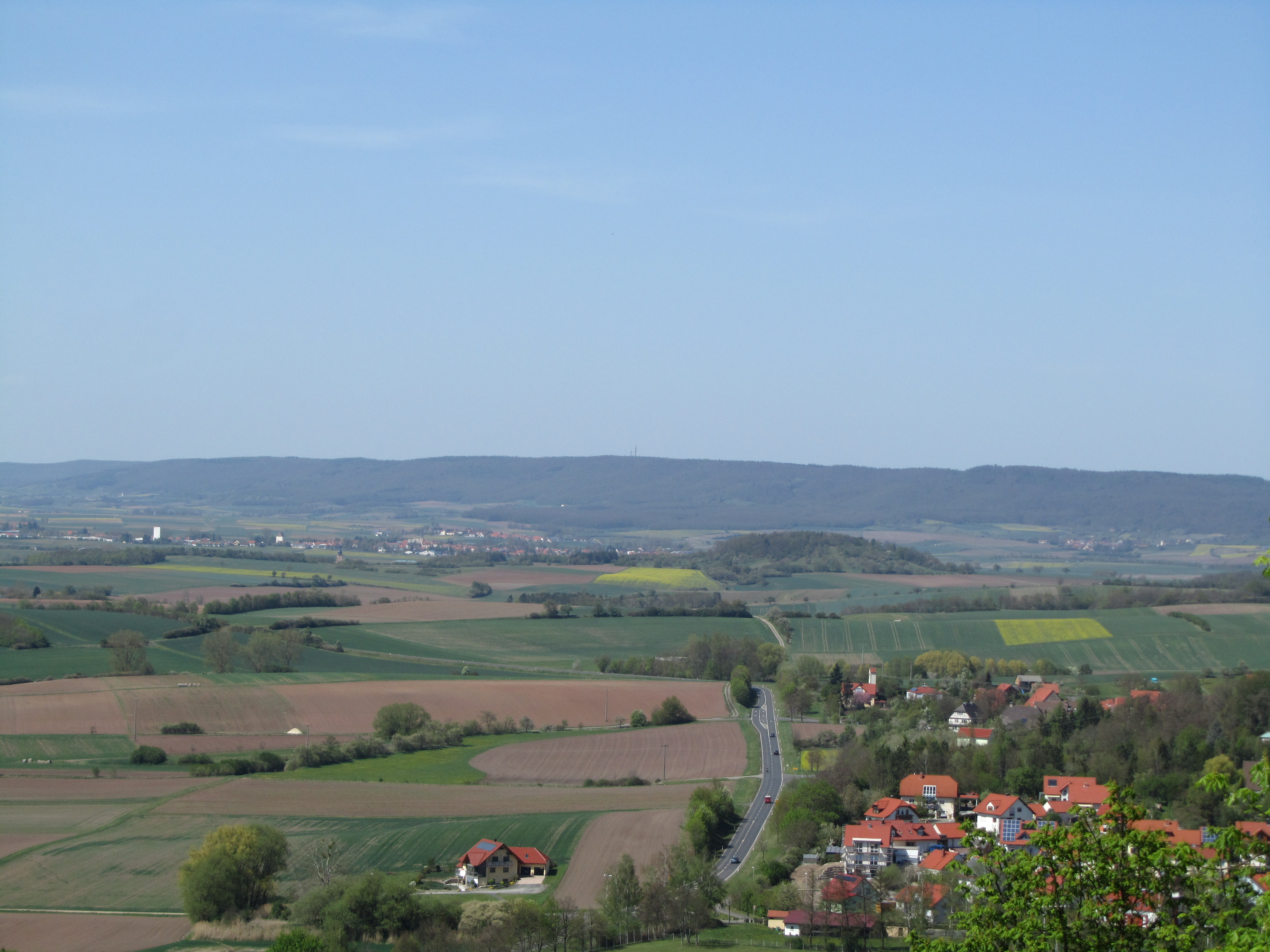 Die Nassacher Höhe (512 m) in den Hassbergen von Süden. (Burg Königsberg).